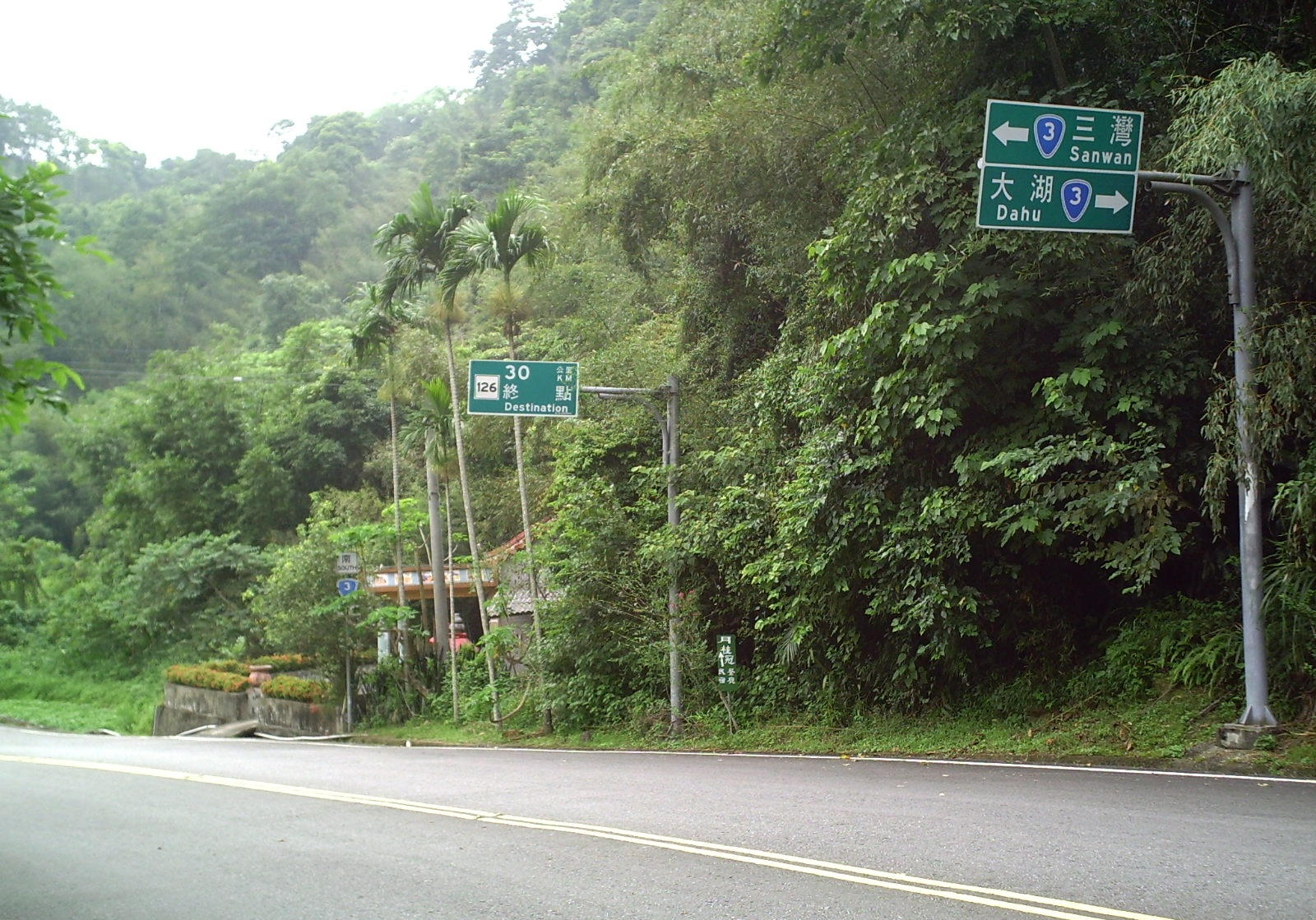 臺灣縣道126號終點，位於苗栗縣獅潭鄉台3線上。